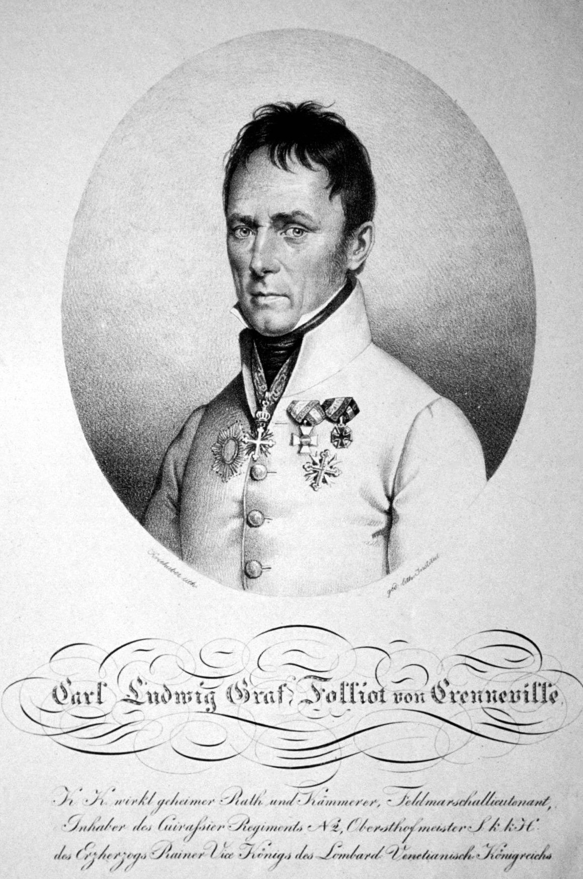 Ludwig Karl Graf von Folliot-Crenneville, Lithographie von Josef Kriehuber, 1842